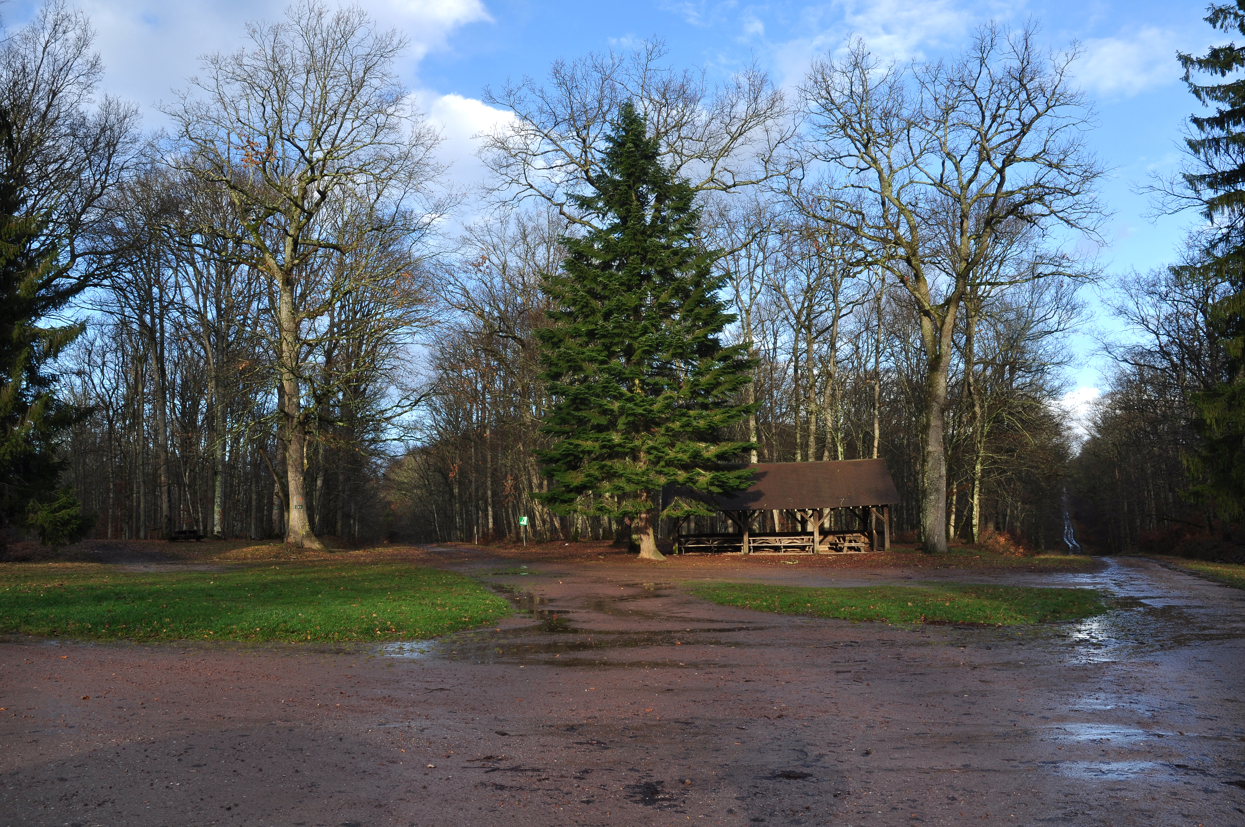 Photo prise en milieu de décembre 2011 après une petite pluie. Cette photo est localisée précisément sur google earth.